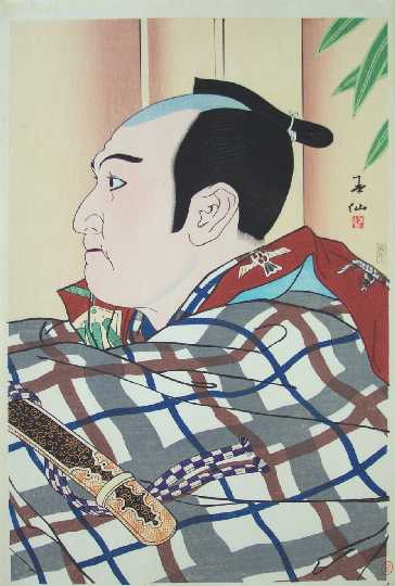 "Bando Mitsugoro VII as Farmer Manbei"